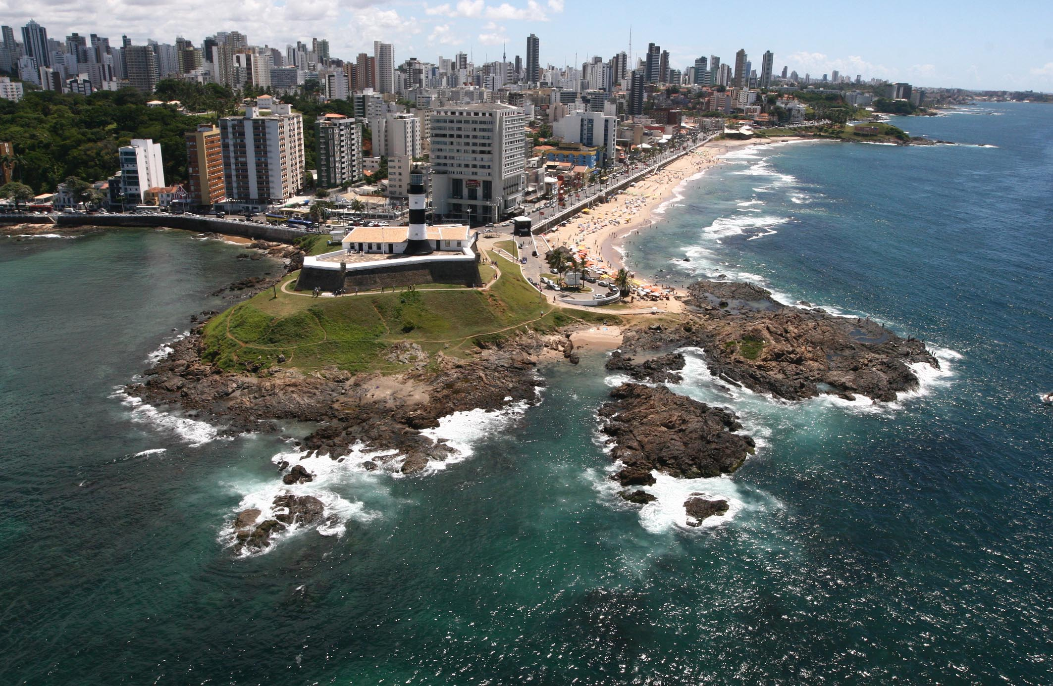 Imagem aérea do Farol da Barra, em Salvador, Bahia, Brasil.